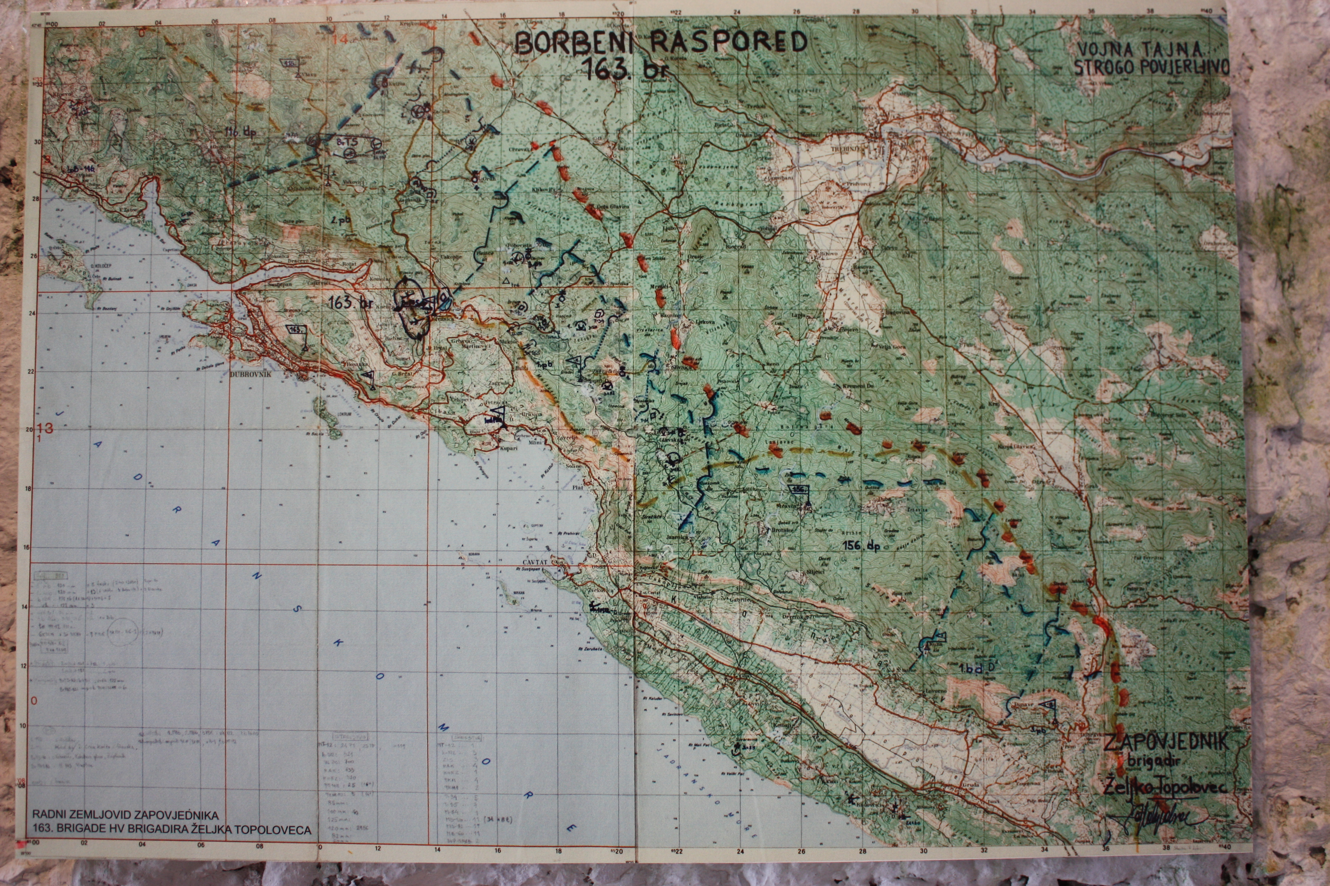 Raspored snaga 163. brigade HV